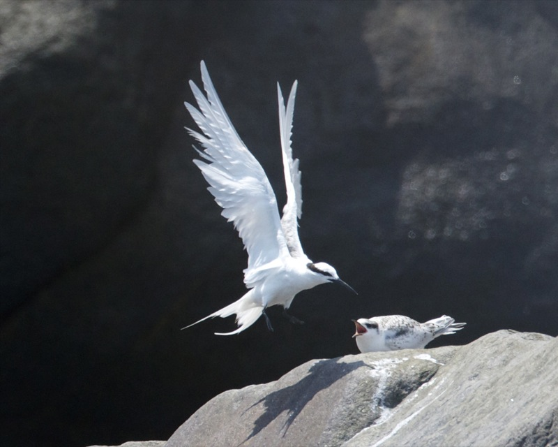 Black-naped Tern - Adult and juvenile Sterna sumatrana ssp Sterna sumatrana sumatrana Date: 25th. September 2011 Location: Rakata, Kratatau, Indonesia Habitat: Rakata Distribution: ssp 690V2563